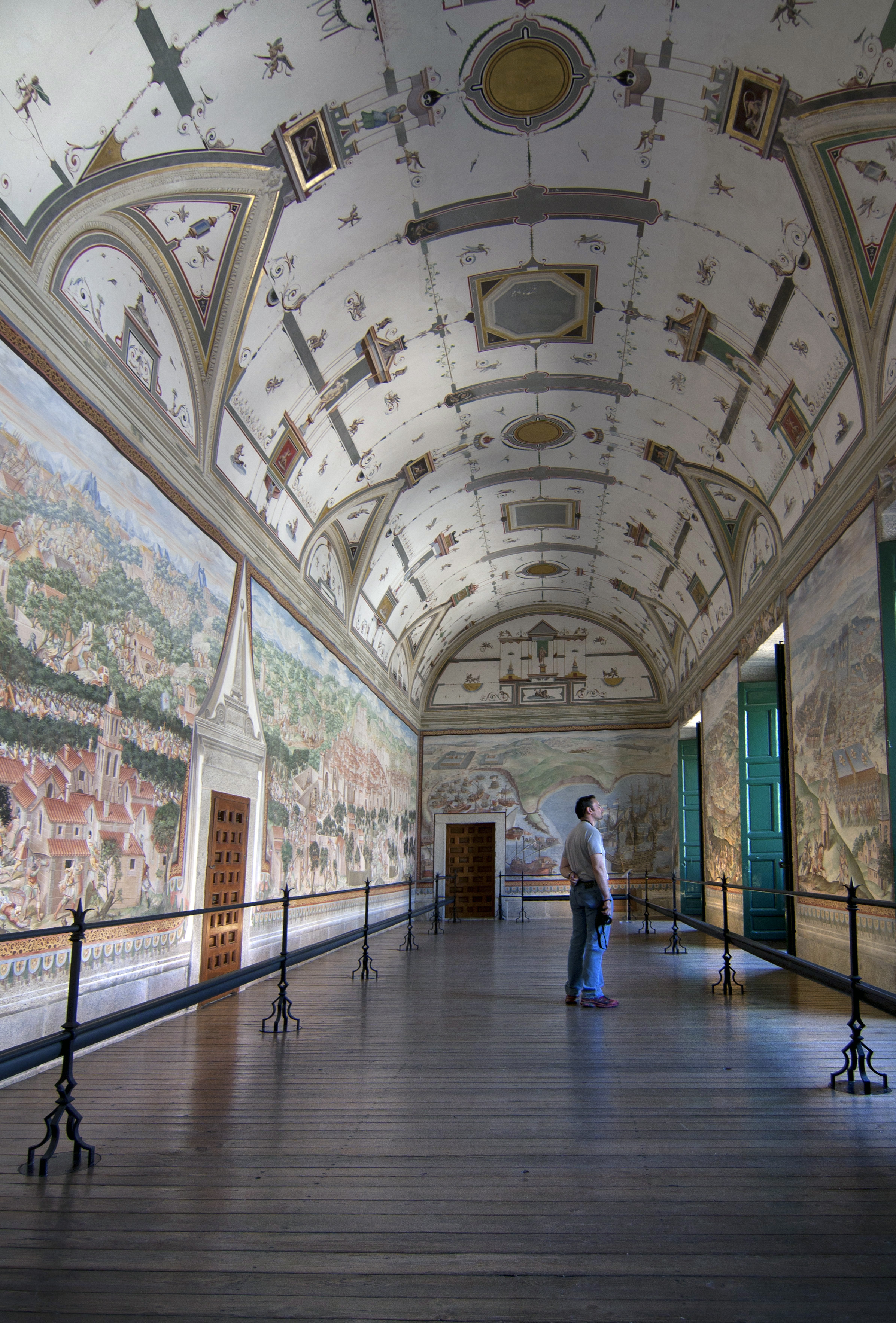 Muestra de la Galería de las Batallas en el interior del Monasterio de El Escorial (Madrid)